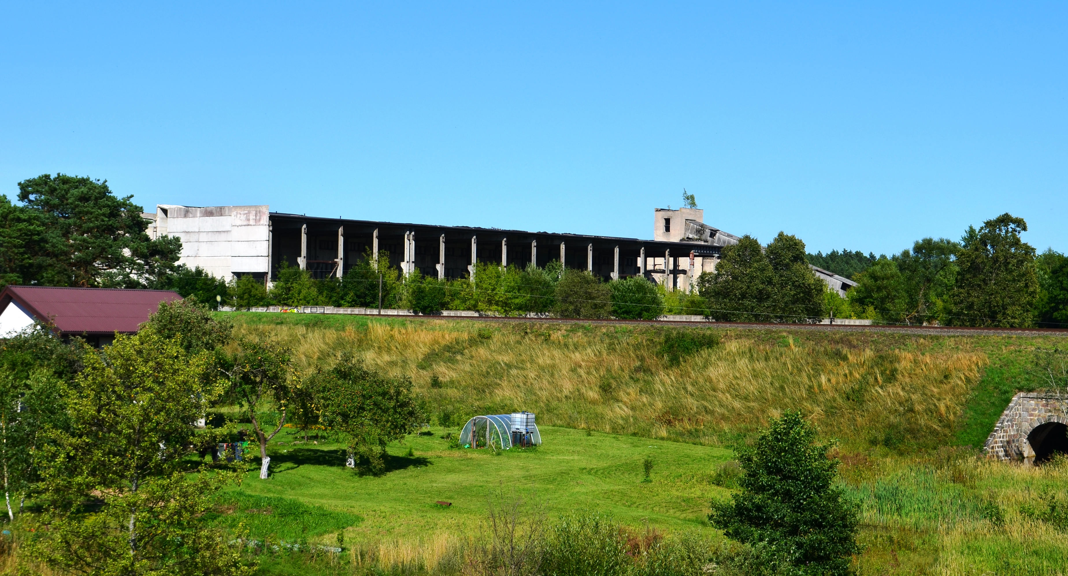 Kažkoks gamybinis pastatas, Bezdonys, Vilniaus r.